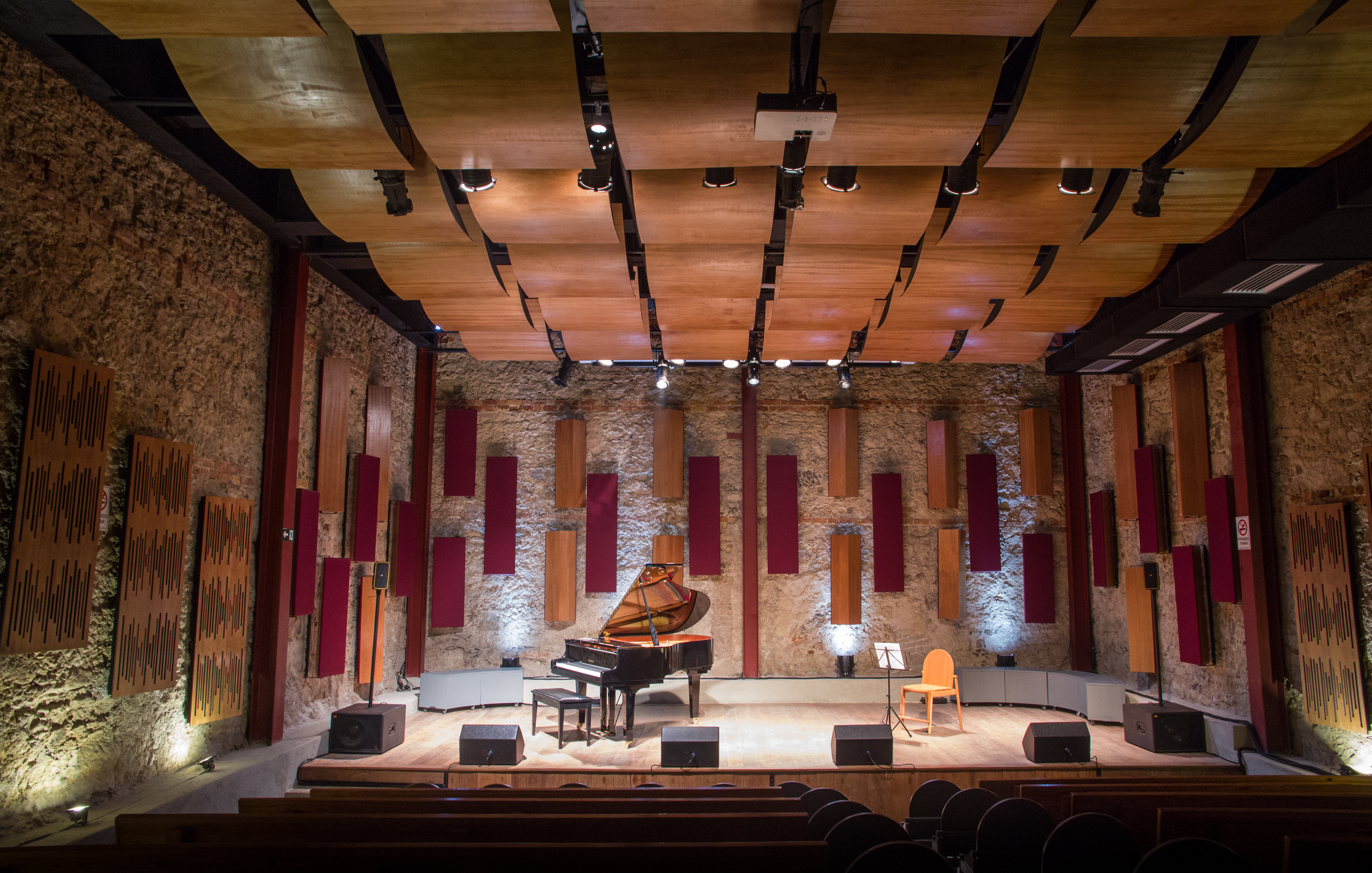 Local onde são realizados os shows